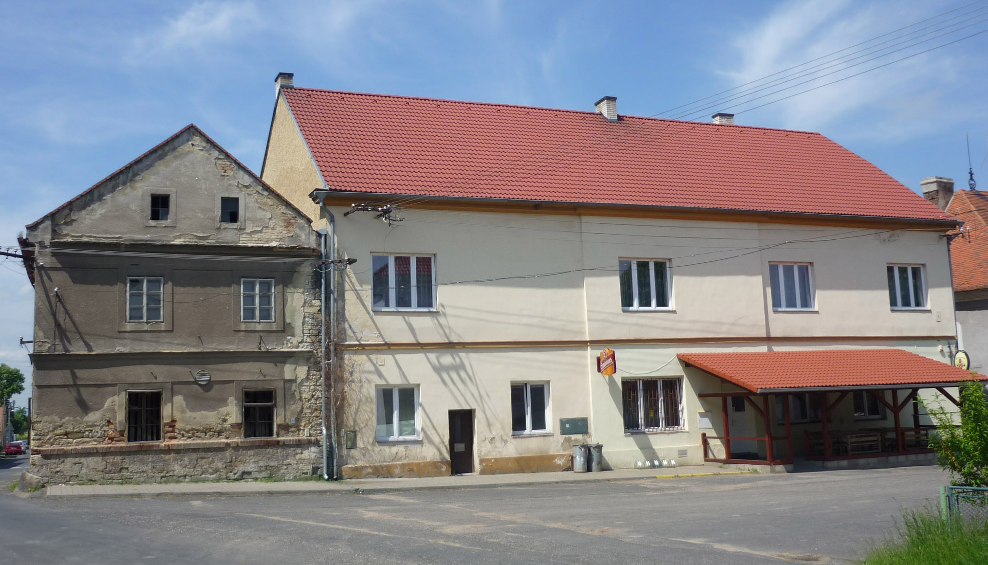 Gasthaus in Liebeschitz Nr. 44